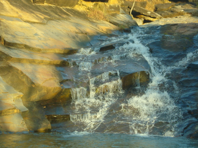 Caxiri, Cachoeira do Povoado da Capela do Rio do Peixe, Pirenópolis.